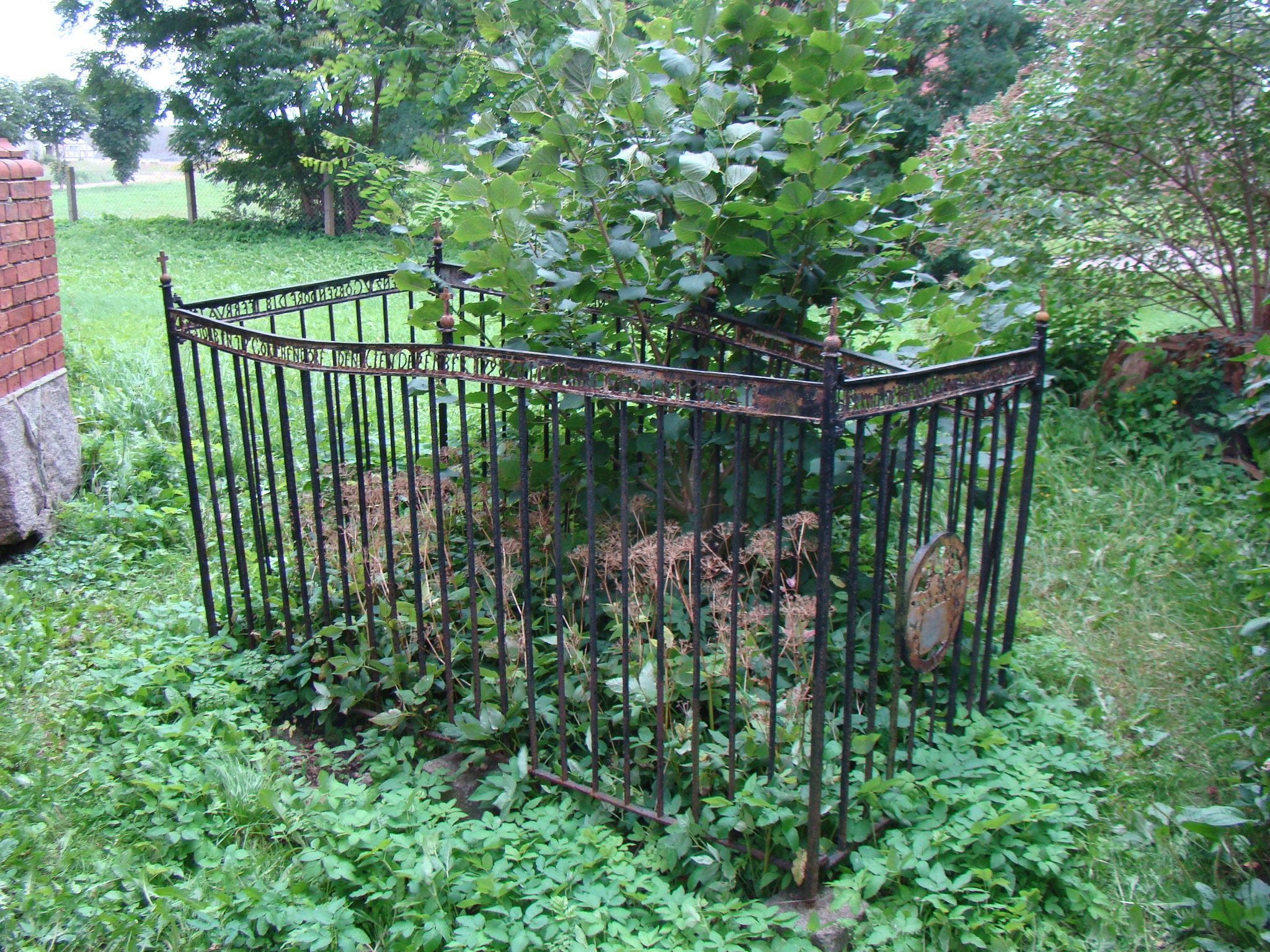 Denkmalgeschützte Grabstätte Sophia Ludovica von Wickede geb. von Blücher (1767–1798) bei der Dorfkirche in Gorschendorf (Malchin)